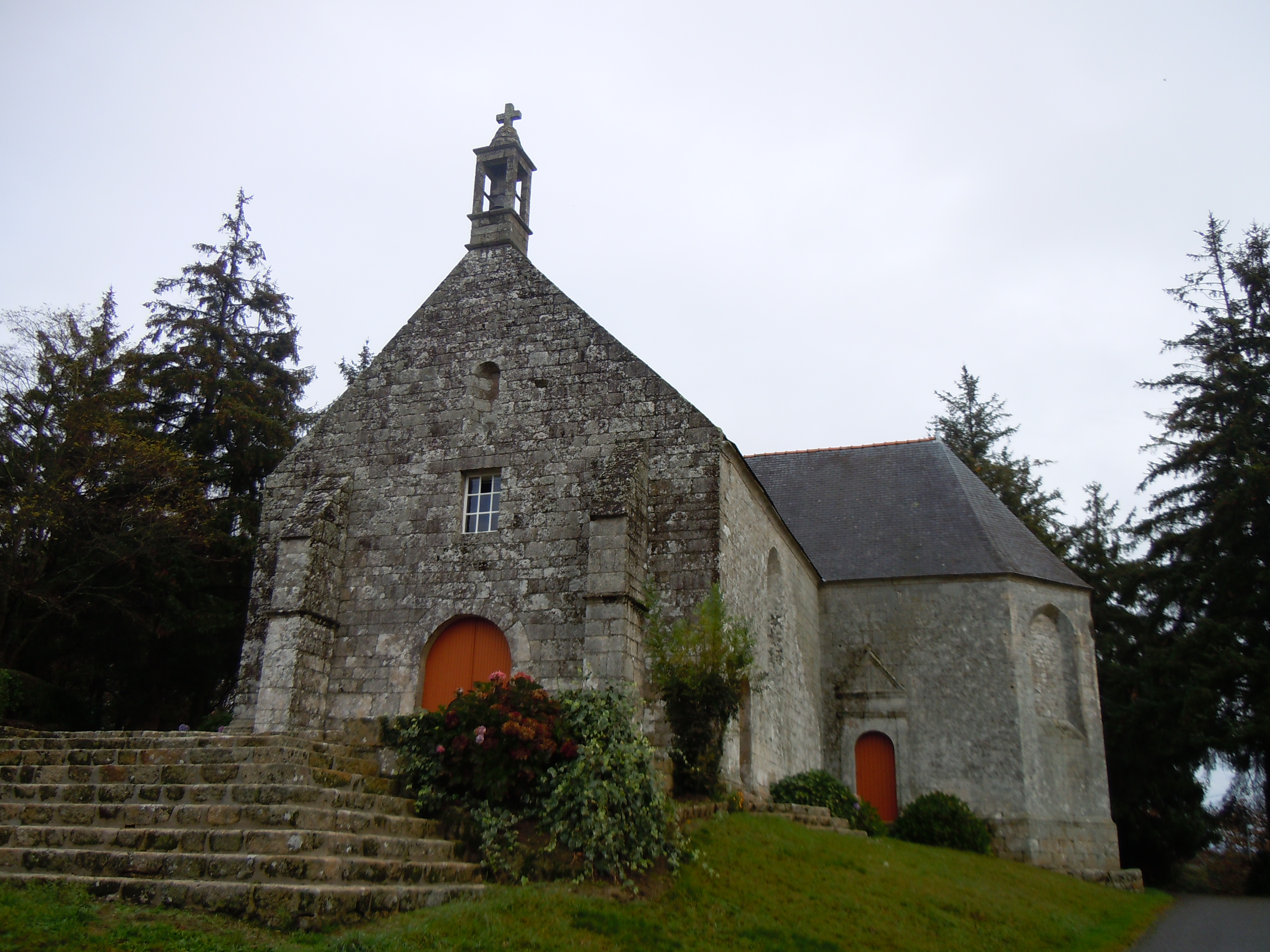 vue générale de la chapelle Saint-Paterne de Meslan (département du Morbihan)